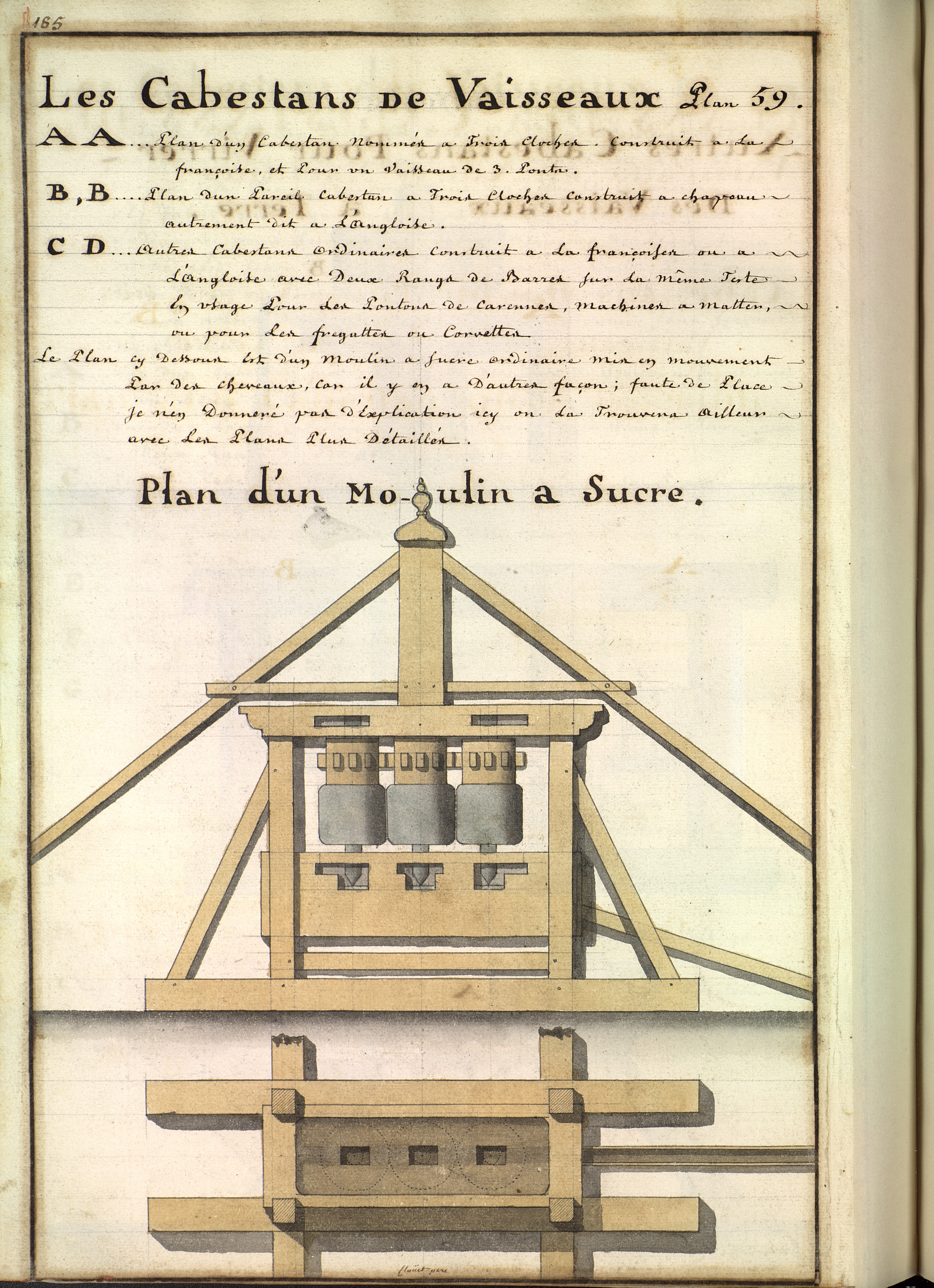 Moulin à sucre du XVIIIè siècle, actionné par des chevaux. Image extraite de Recueil de toutes sortes de machines, d'outils, et d'ustensiles en usages pour la construction et carenne des vaisseaux, et de tout ce qui a raport à leurs armements dans un arsenal de marine. Pr[emie]re partie par Deslongchamps l'ainé, lieutenant des vaisseaux du Roy et du port de Brest en 1763. Plans des hunes, des barres d'hunes, chuquets, barres de peroquet et autres pièces concernant la construction de la mature des vaisseaux 1767. Manuscrit numérisé de la bibliothèque municipale de Brest, France.